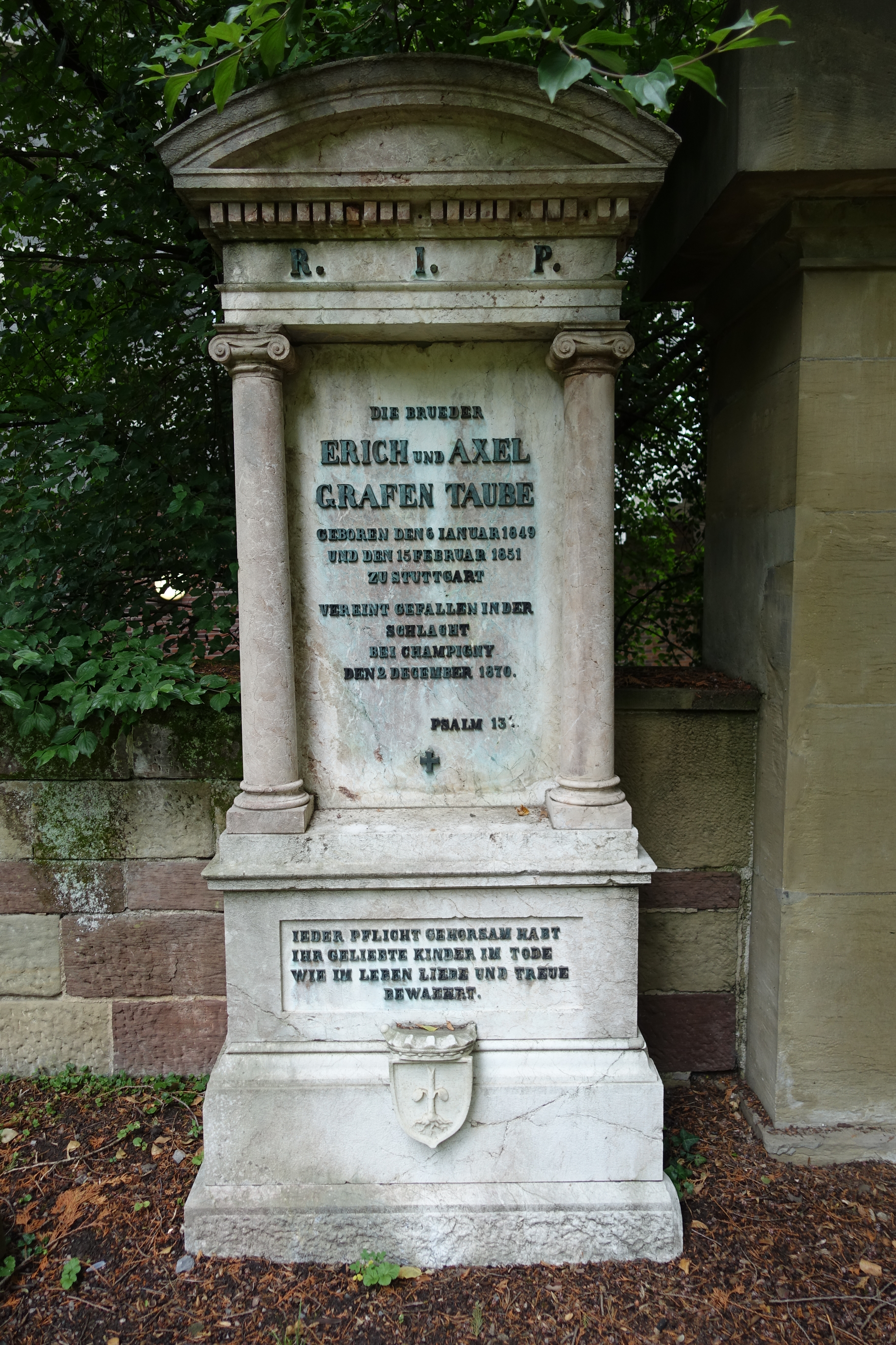 Grab von Erich und Axel Grafen Taube auf dem Hoppenlaufriedhof